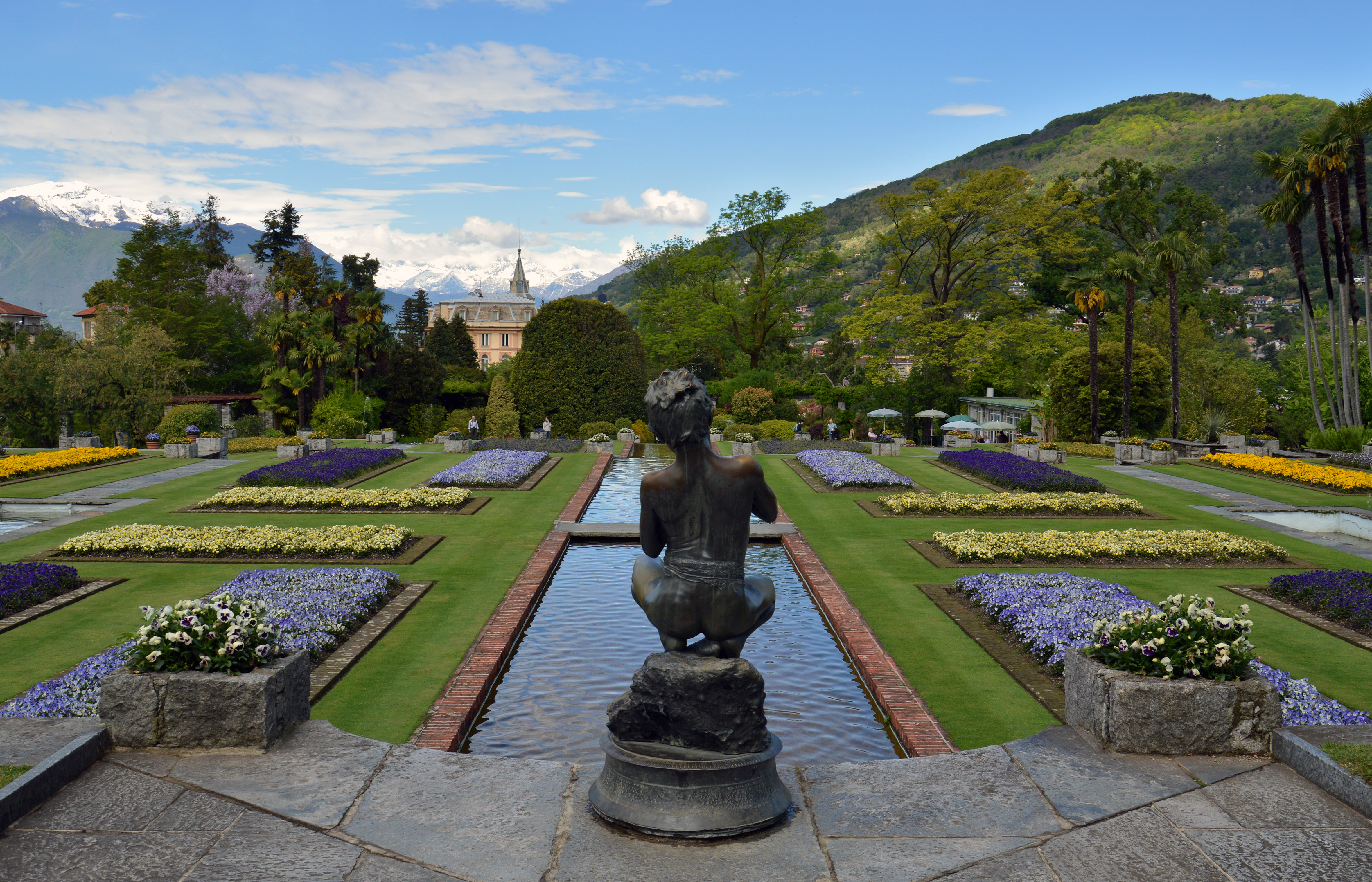 in Explore May 3, 2014 #472 Il pescatore Villa Taranto Verbania, Lago Maggiore Italy